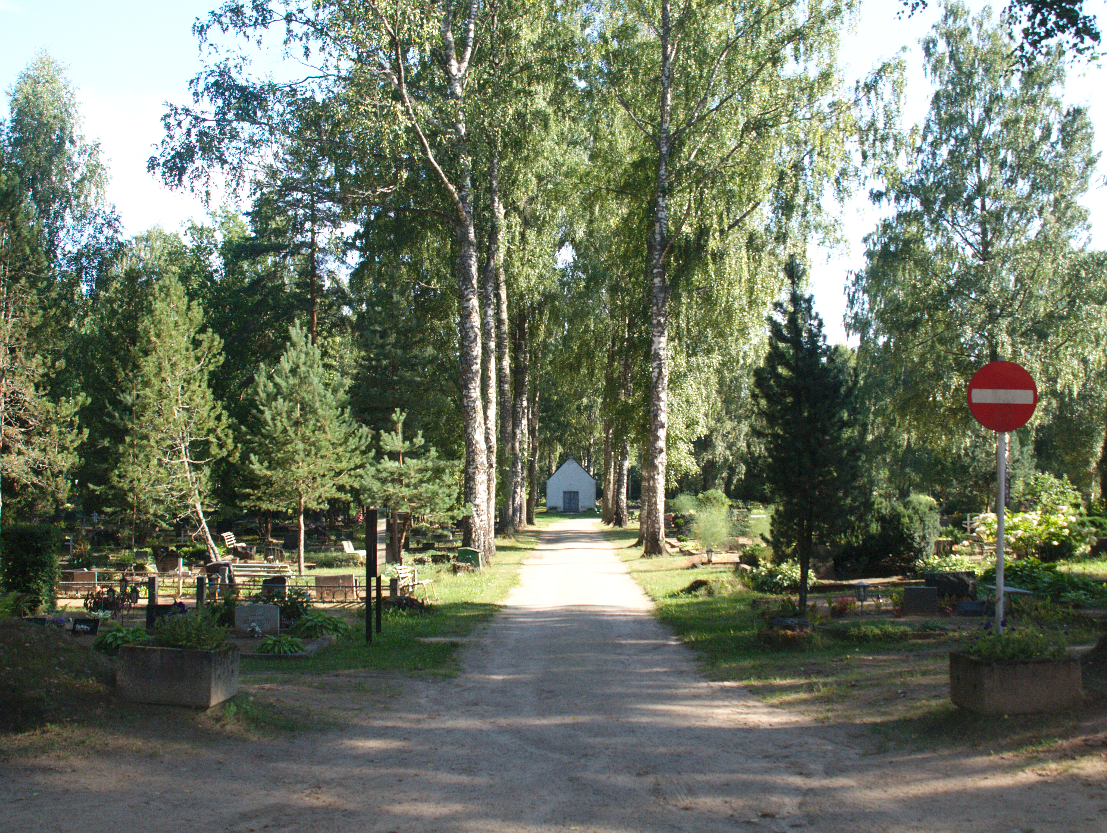 Valga Toogipalu kalmistu